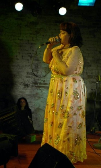 Chanteuse de Rai